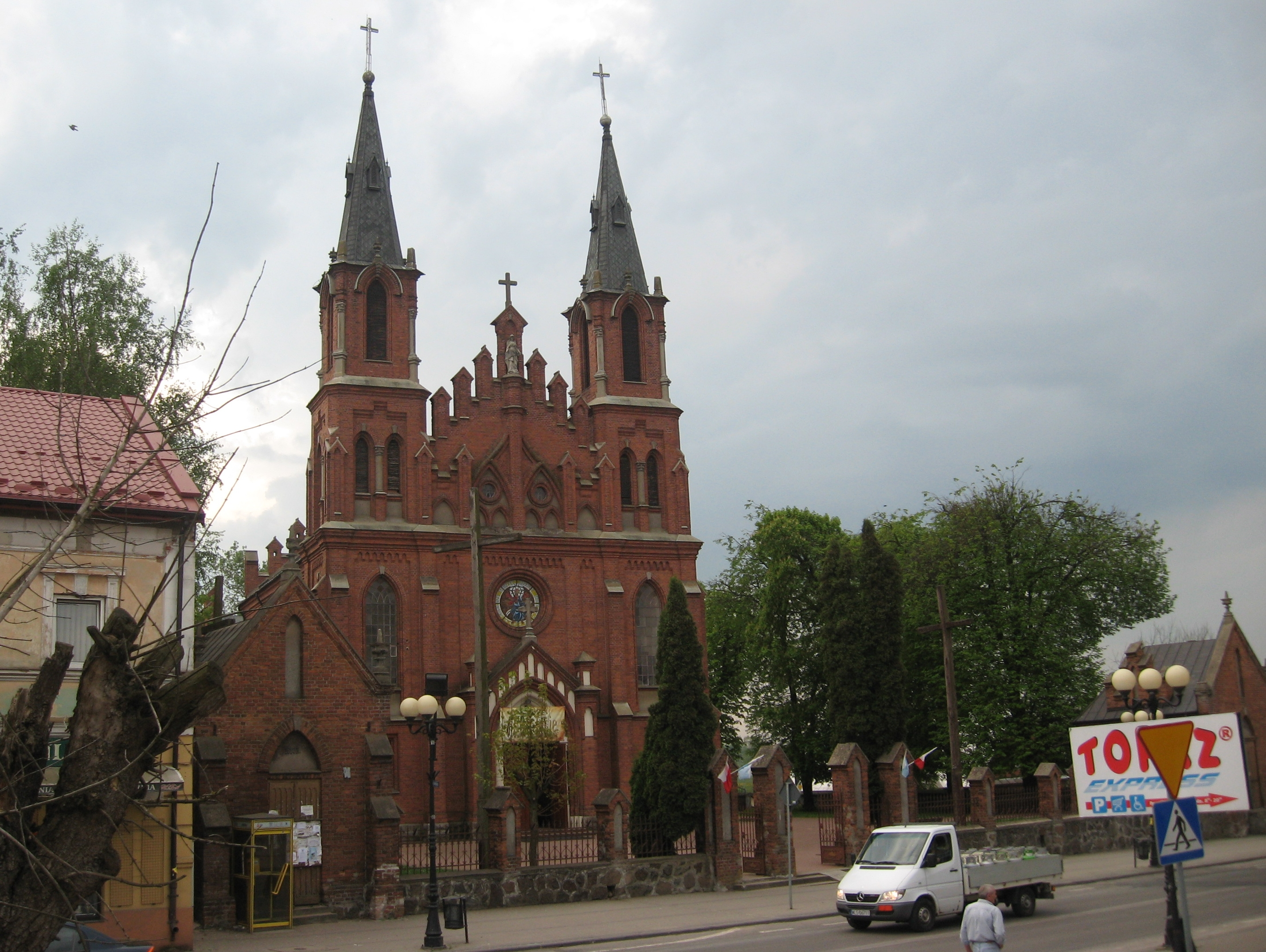 Łosice. Kościół p.w. św. Zygmunta Króla i Męczennika.